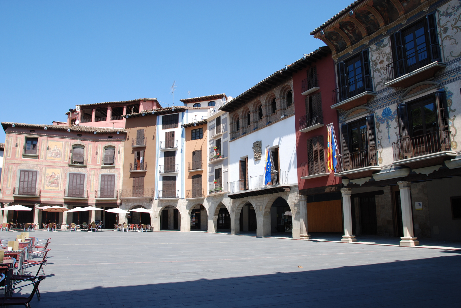 Plaza del ayuntamiento de Graus